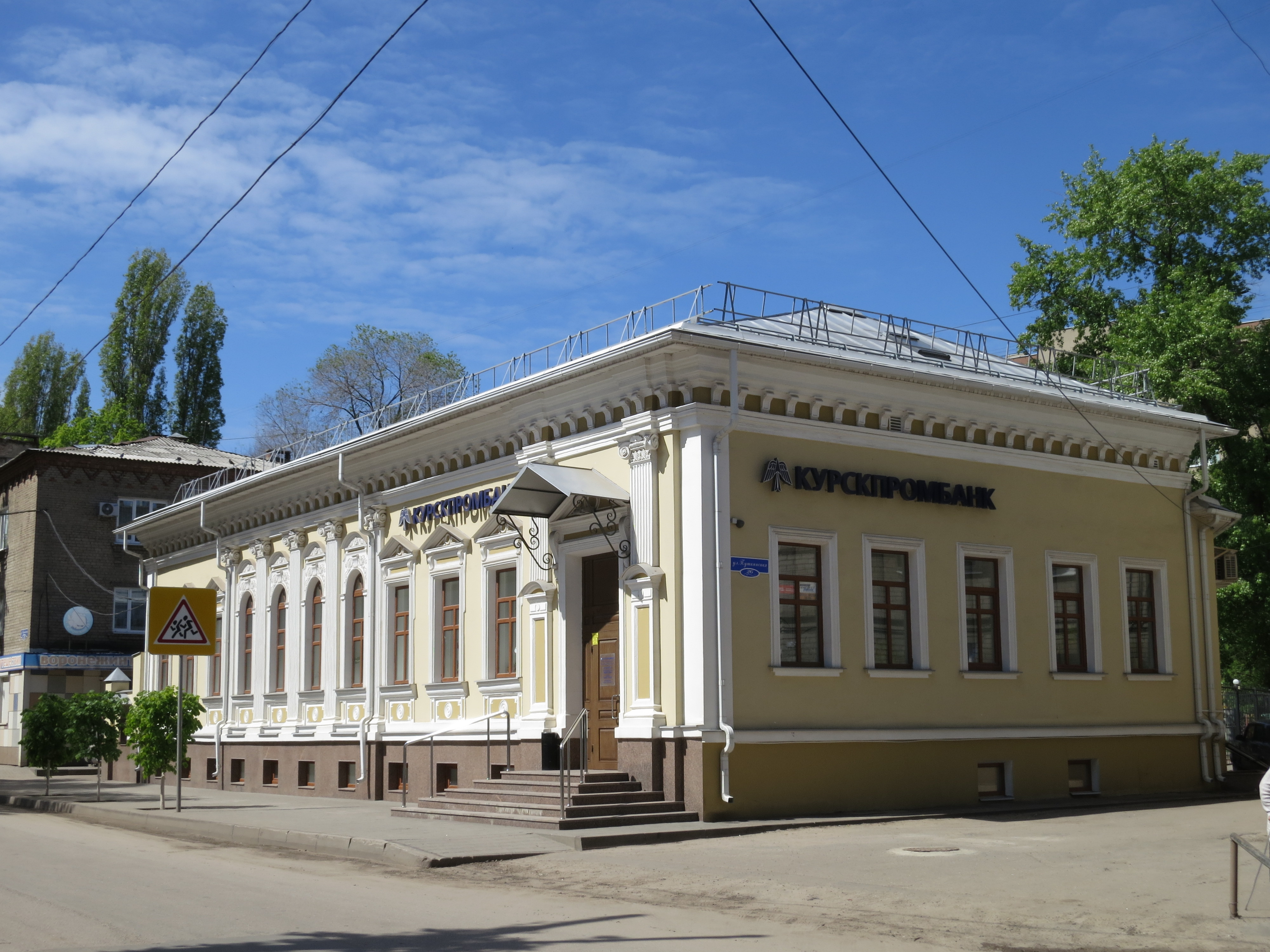 Дом А. Н. Клочкова: улица Пушкинская, 26, Воронеж, Воронежская область